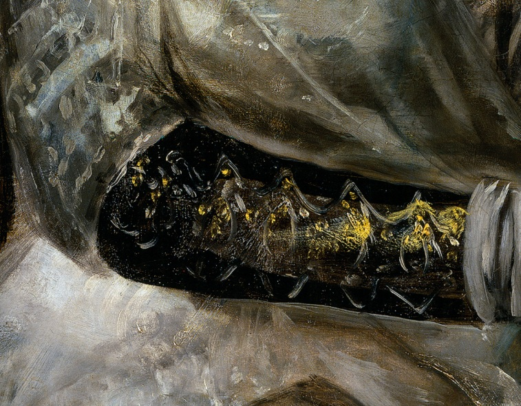 Detal Portretu Josefy Bayeu Francisca Goi na którym widoczne są szybkie pociągnięcia pędzlem przypominające szkic.